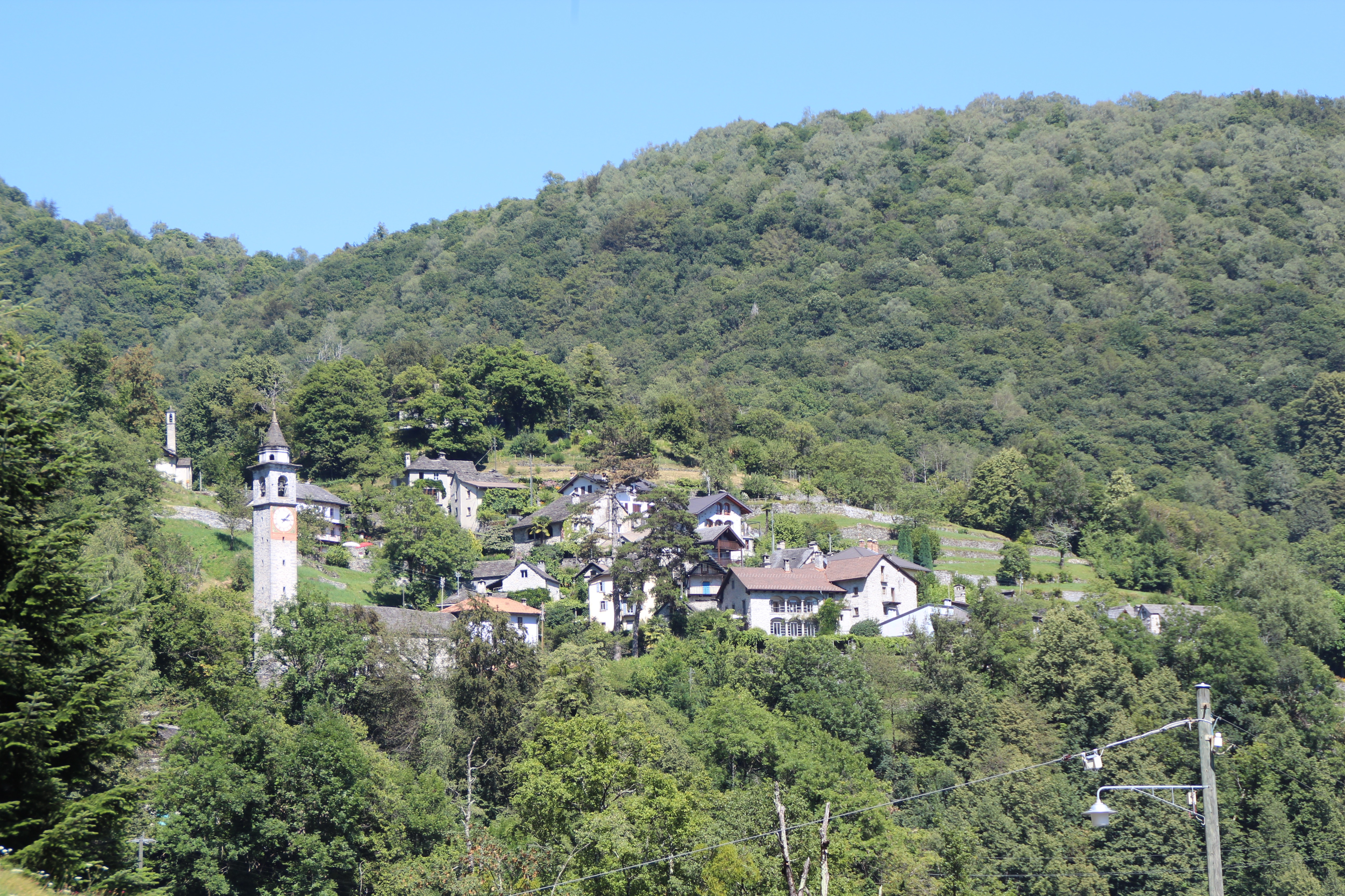 Berzona